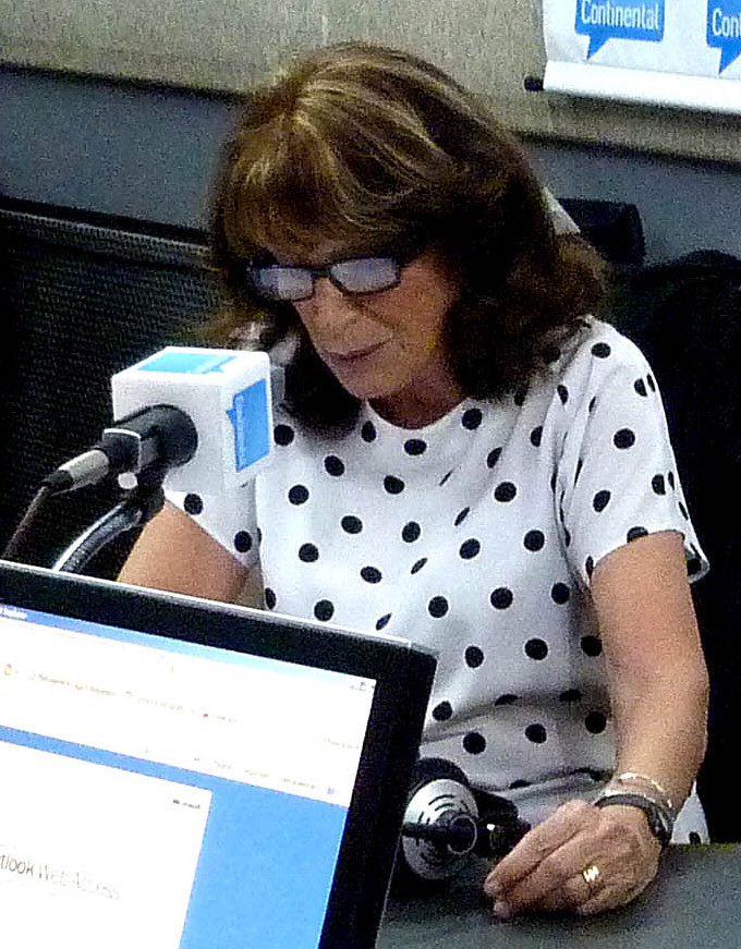 Alfonsín en los estudios de Radio Continental Alfonsín en los estudios de Radio Continental